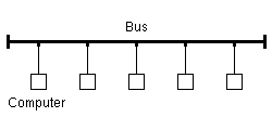 Bustopologie.